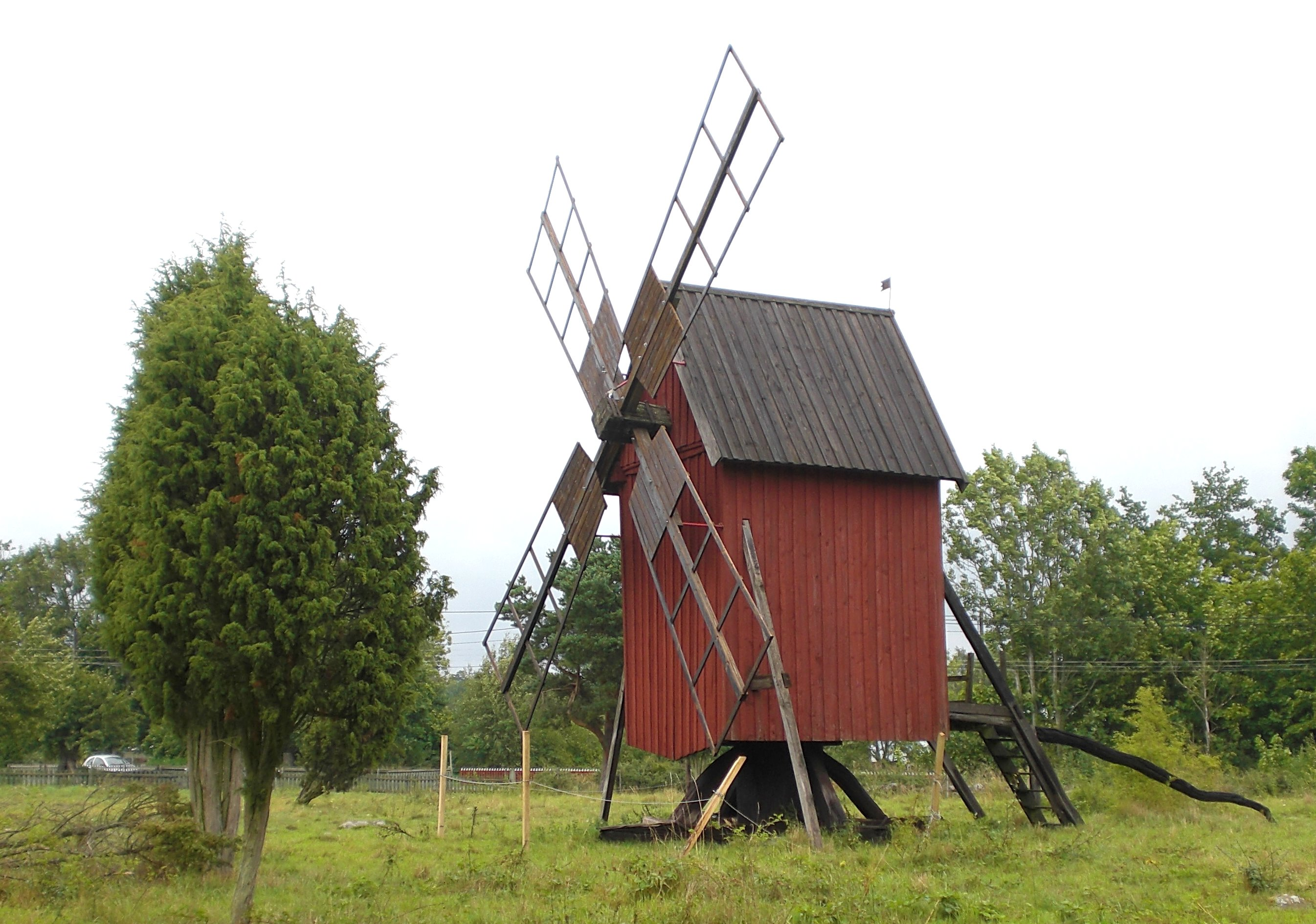 Windmühle in Ramsättra auf Öland